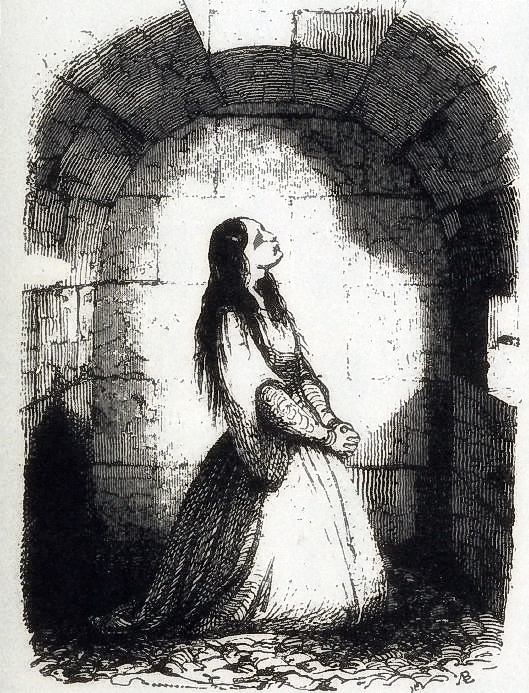 "La Quintrala. Catalina de Los Ríos y Lisperguer, según un grabado de la época."